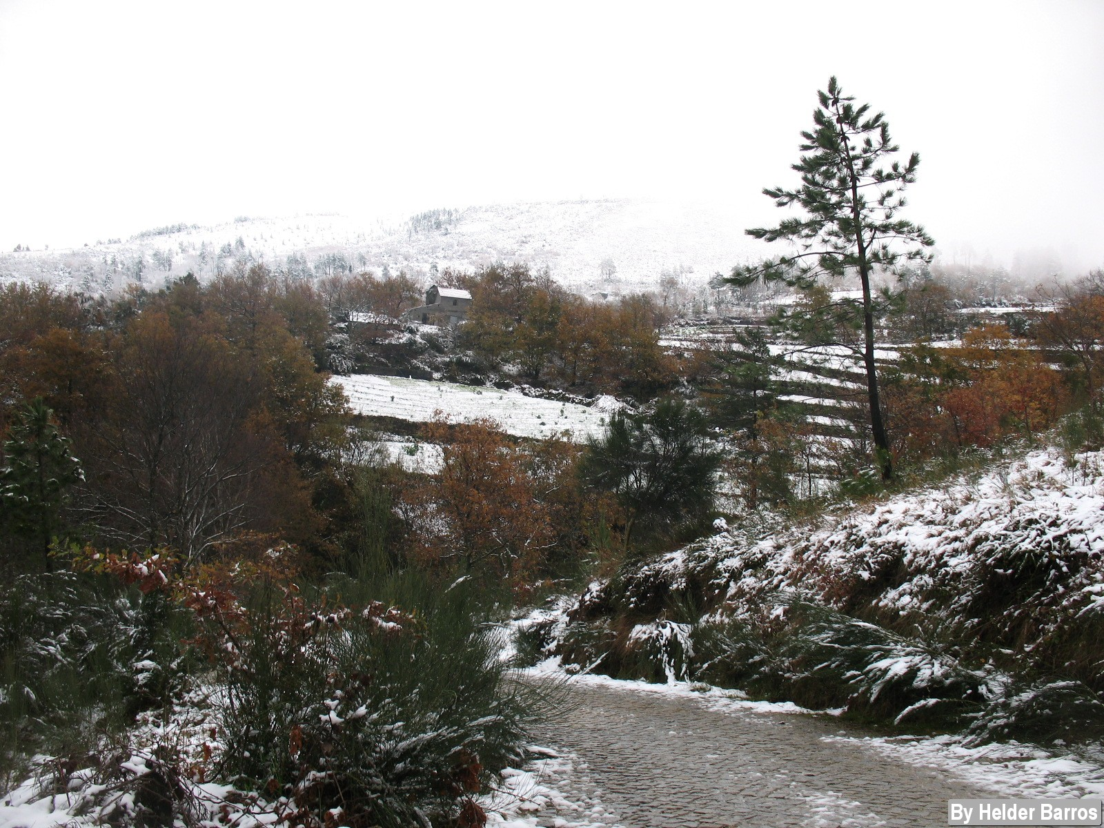 Amarante Serra do Marão